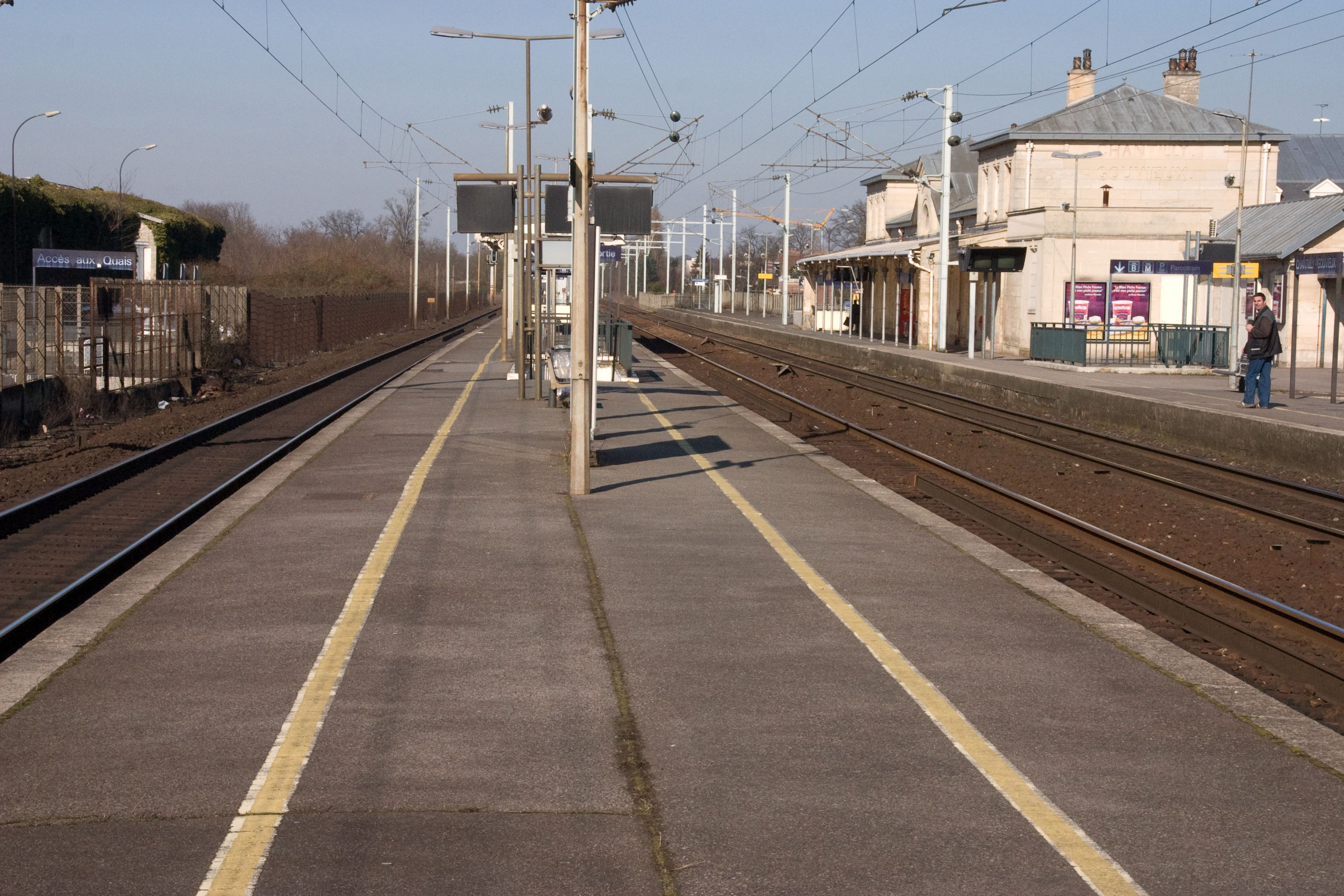 Gare de Chantilly - Gouvieux, Chantilly, département de l'Oise (France)